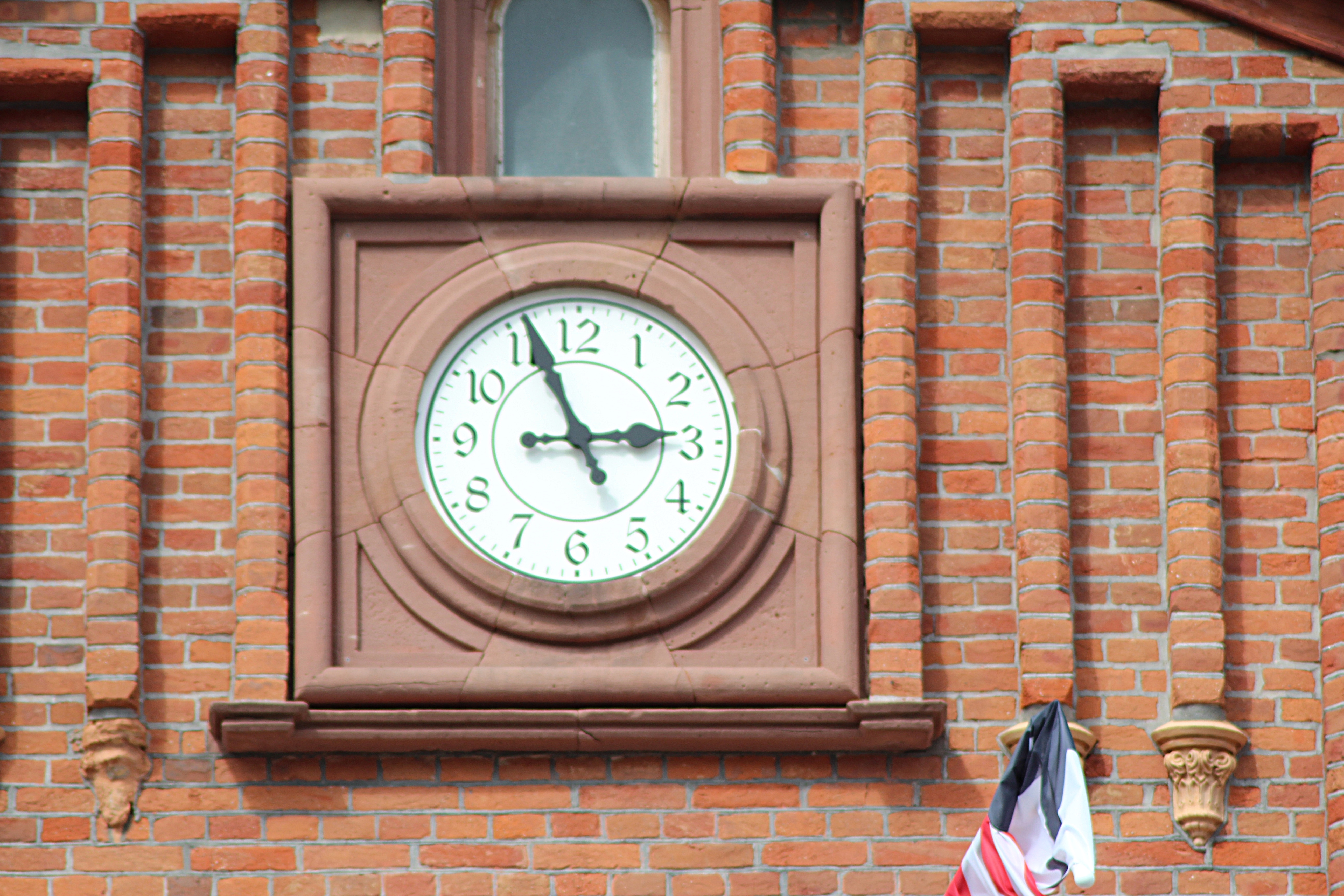 Die im Dezember 2015 zum Abschluss der Renovierungsarbeiten eingesetzte neue Uhr im Empfangsgebäude des Bahnhofs Kirchhain (Bz Kassel) auf der Straßenseite des Gebäudes